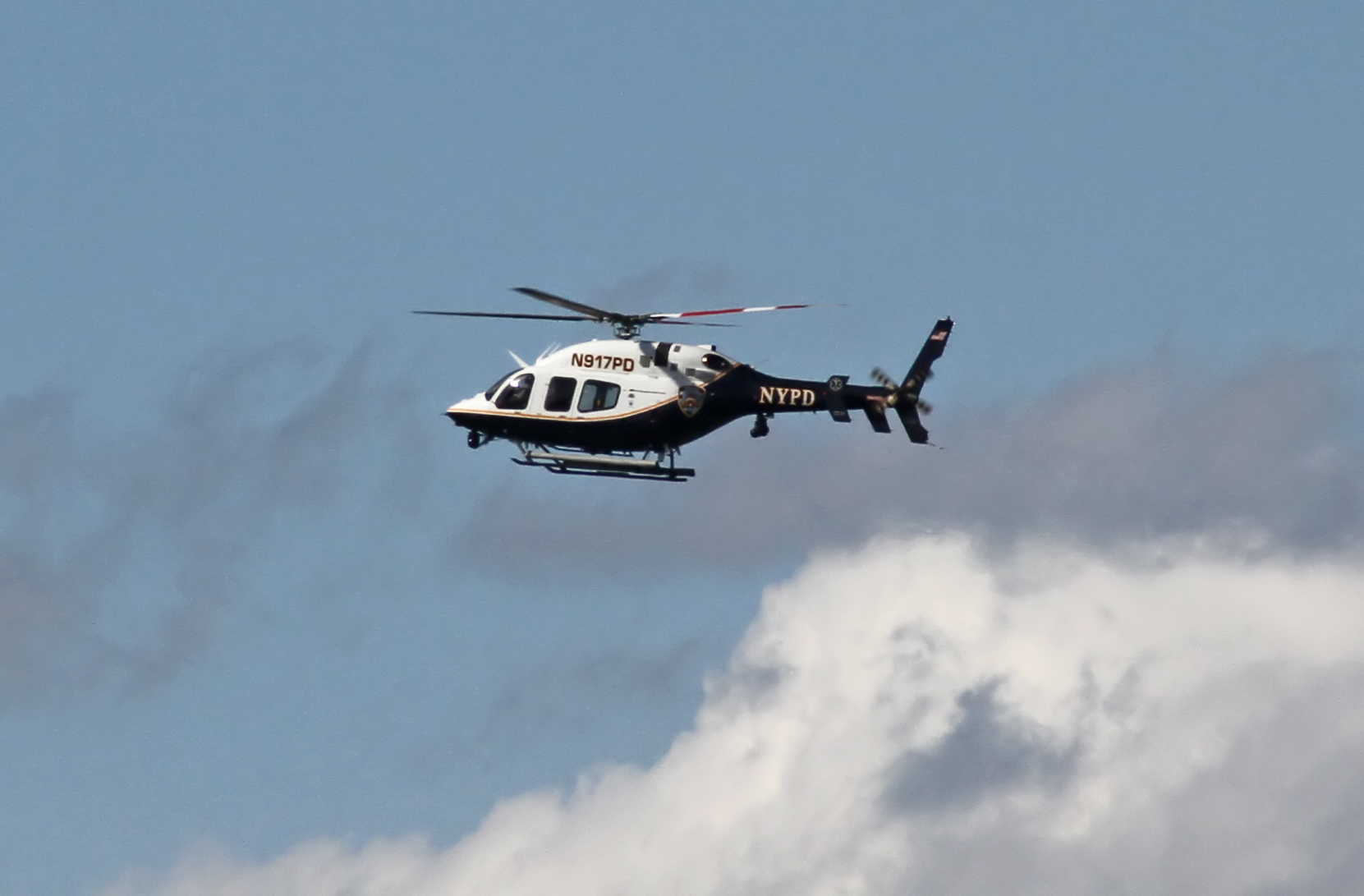 NYPD Police Helicopter N917PD Bell 429 GlobalRanger